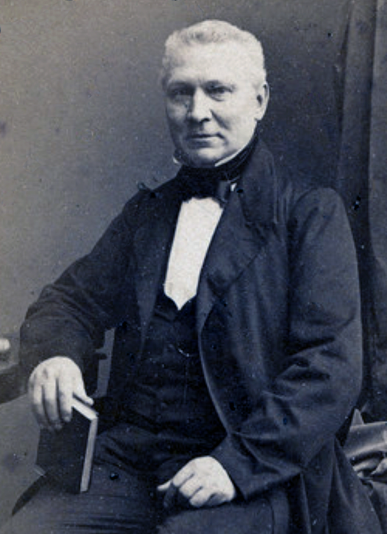 Frederik Cornelis Engelbrecht (1804-1896), hoofdadministrateur van de marine en kapitein ter zee honorair